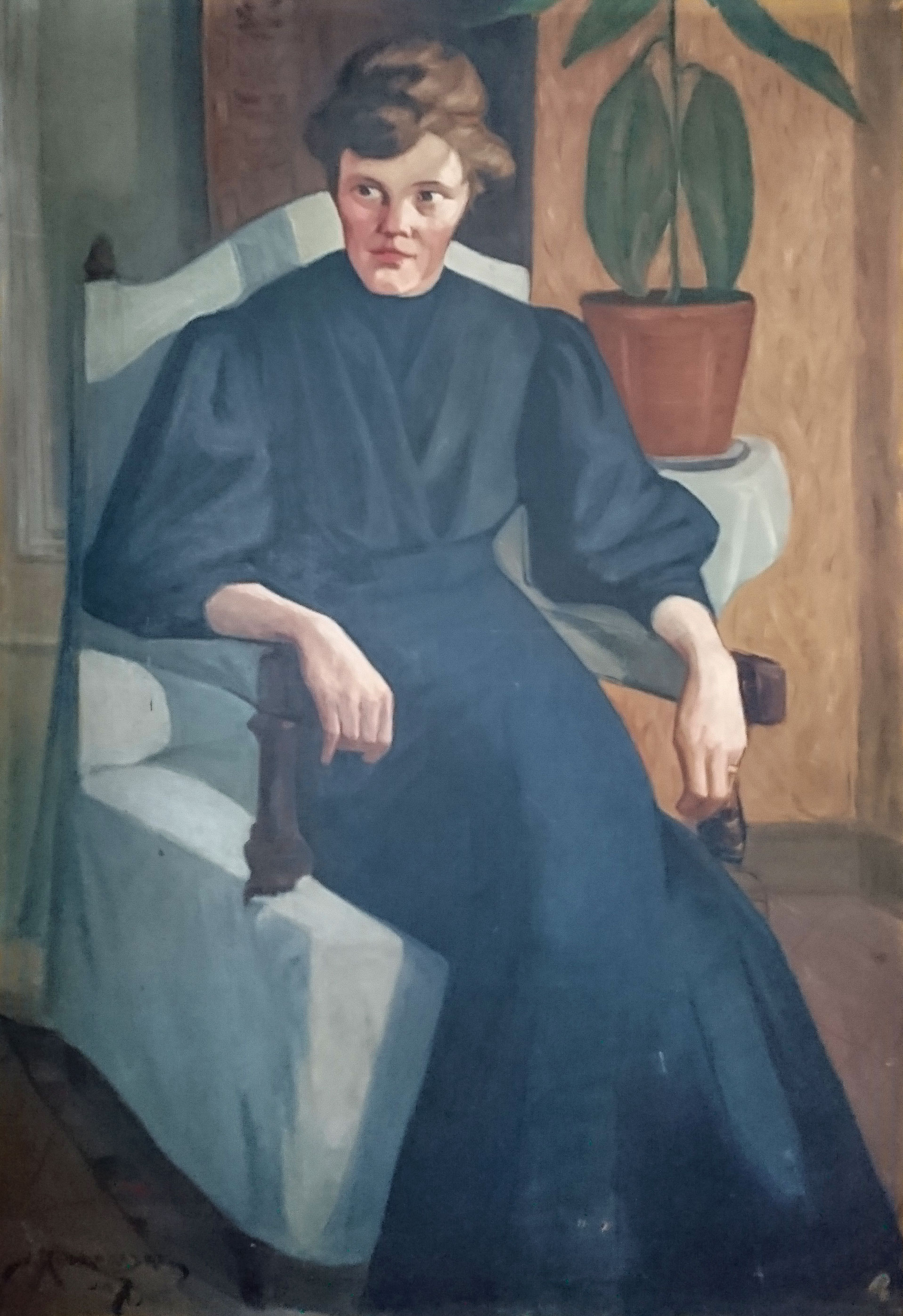 Jalmari Ruokokosken ensimmäinen kihlattu Olga juhala-asussa ja kihlasormus kädessä.